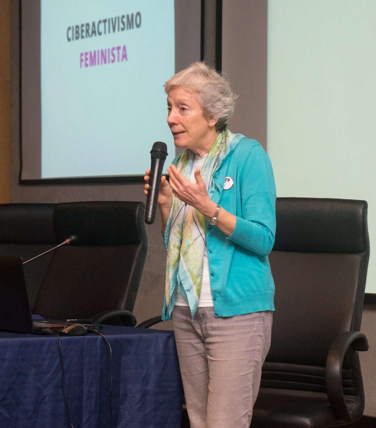 María Simon en el Encuentro de Feministas Desorganizadas. 9 de setiembre de 2017 en la Facultad de Ingeniería de la Universidad de la República. Montevideo, Uruguay.